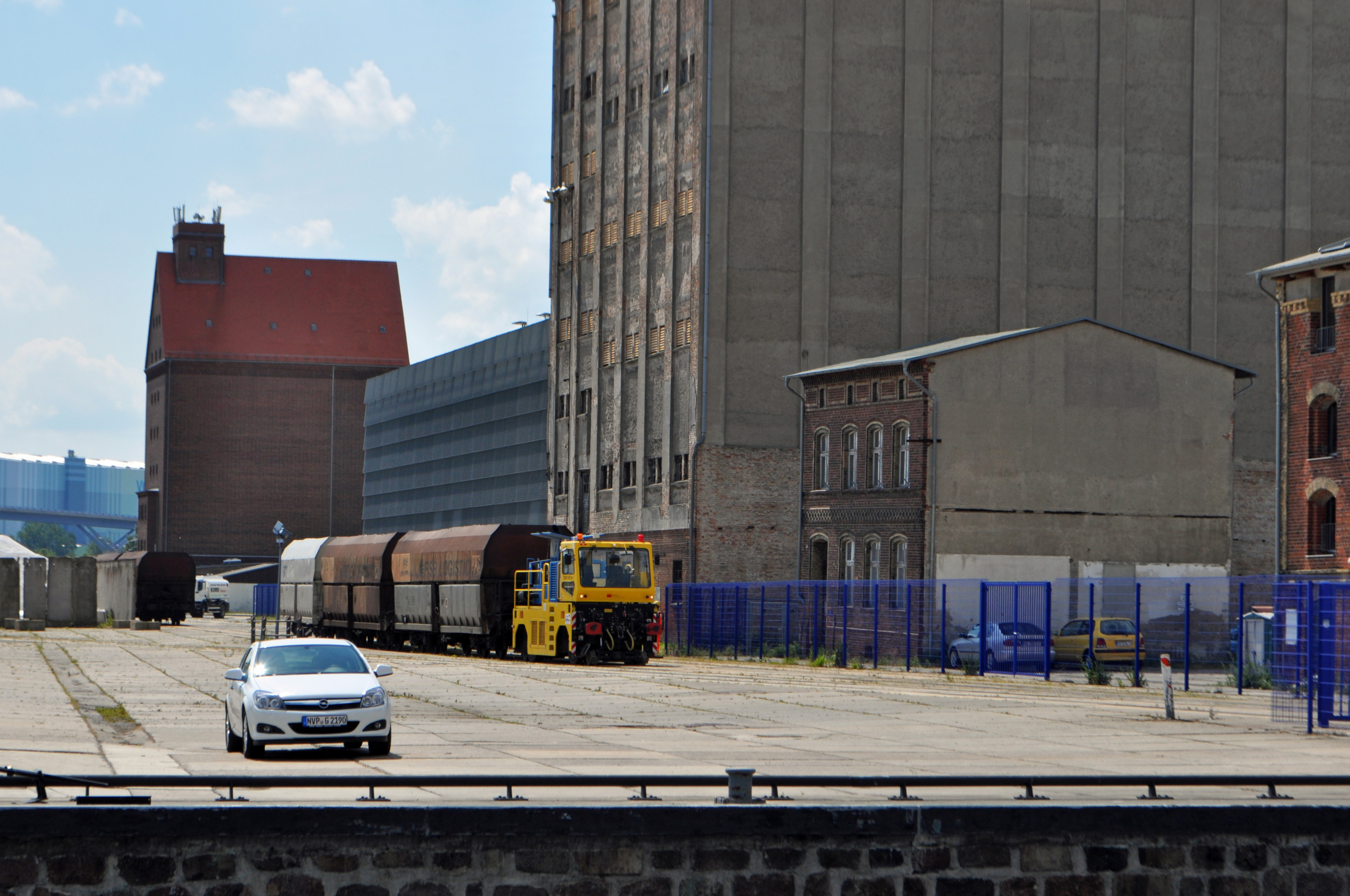 Speicher, Parkhaus, Silo III